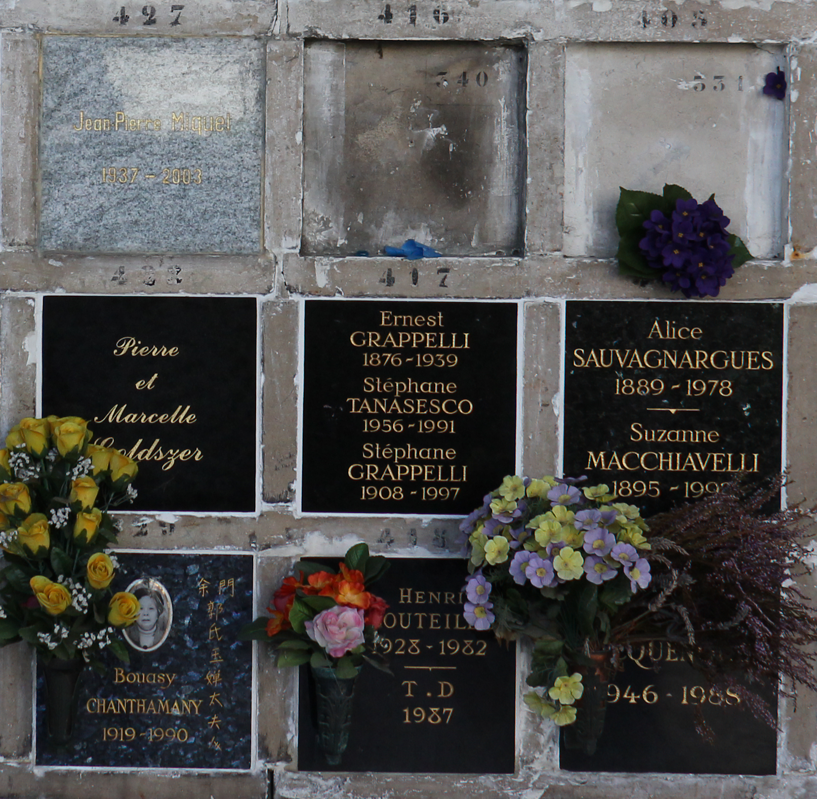 Cases du columbarium du cimetière du Père-Lachaise.